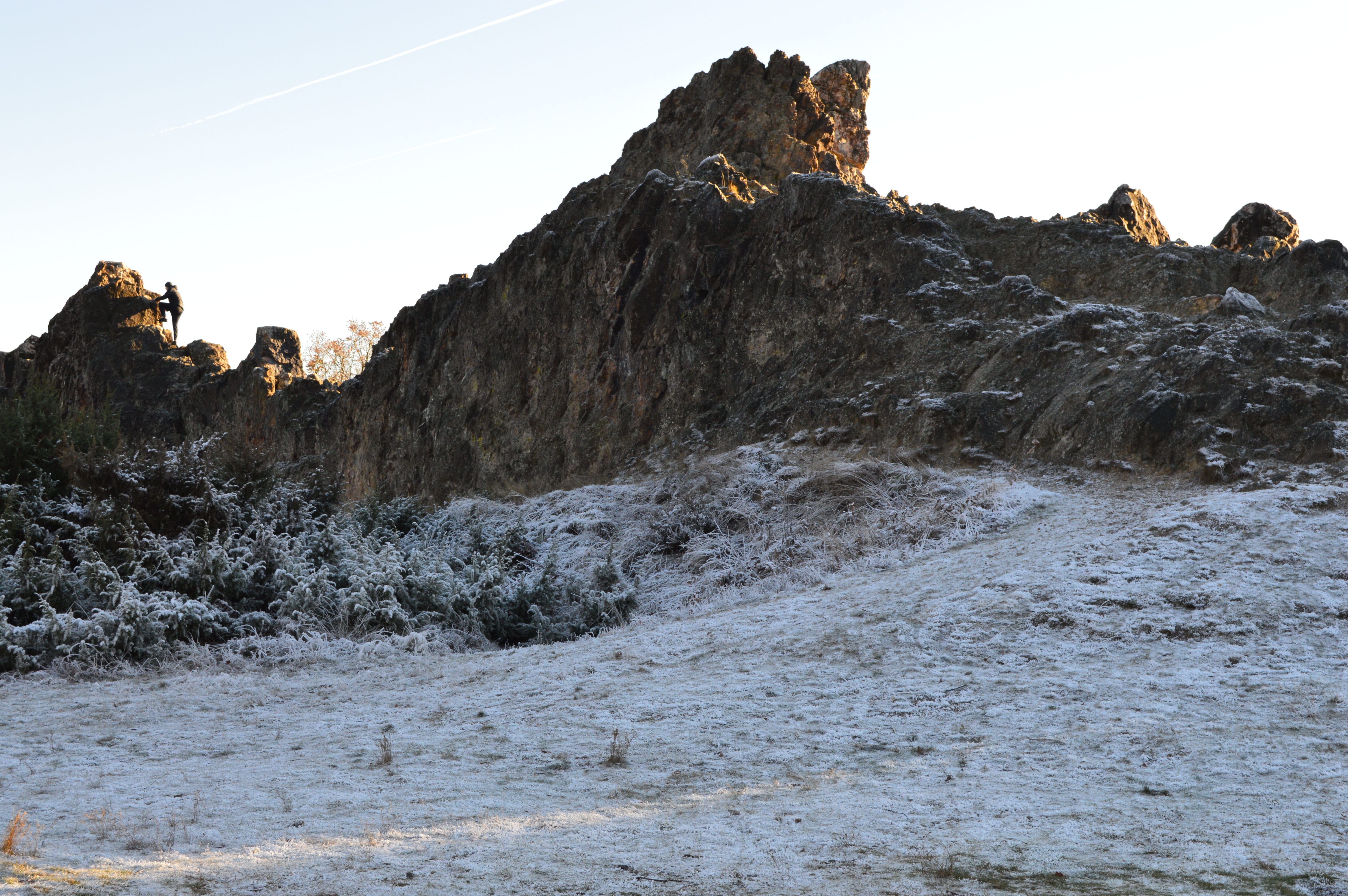 Eschbacher Klippen Dezember 2016